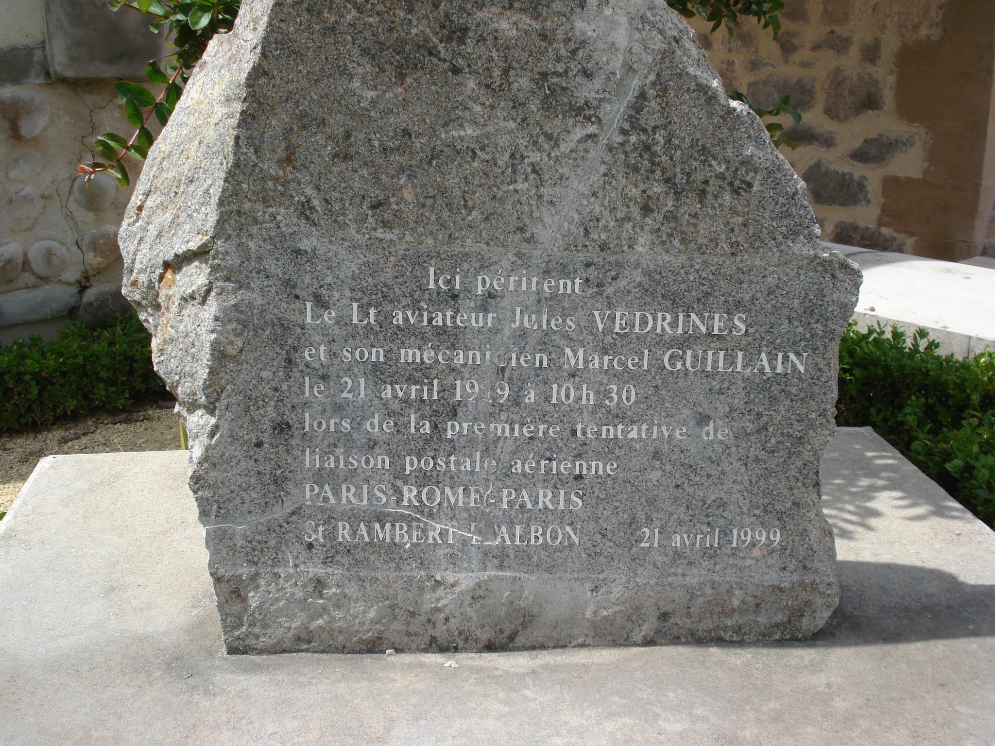 plaque commémorative de la mort de l'aviateur Jules Védrines à Saint-Rambert-d'Albon dans la Drôme